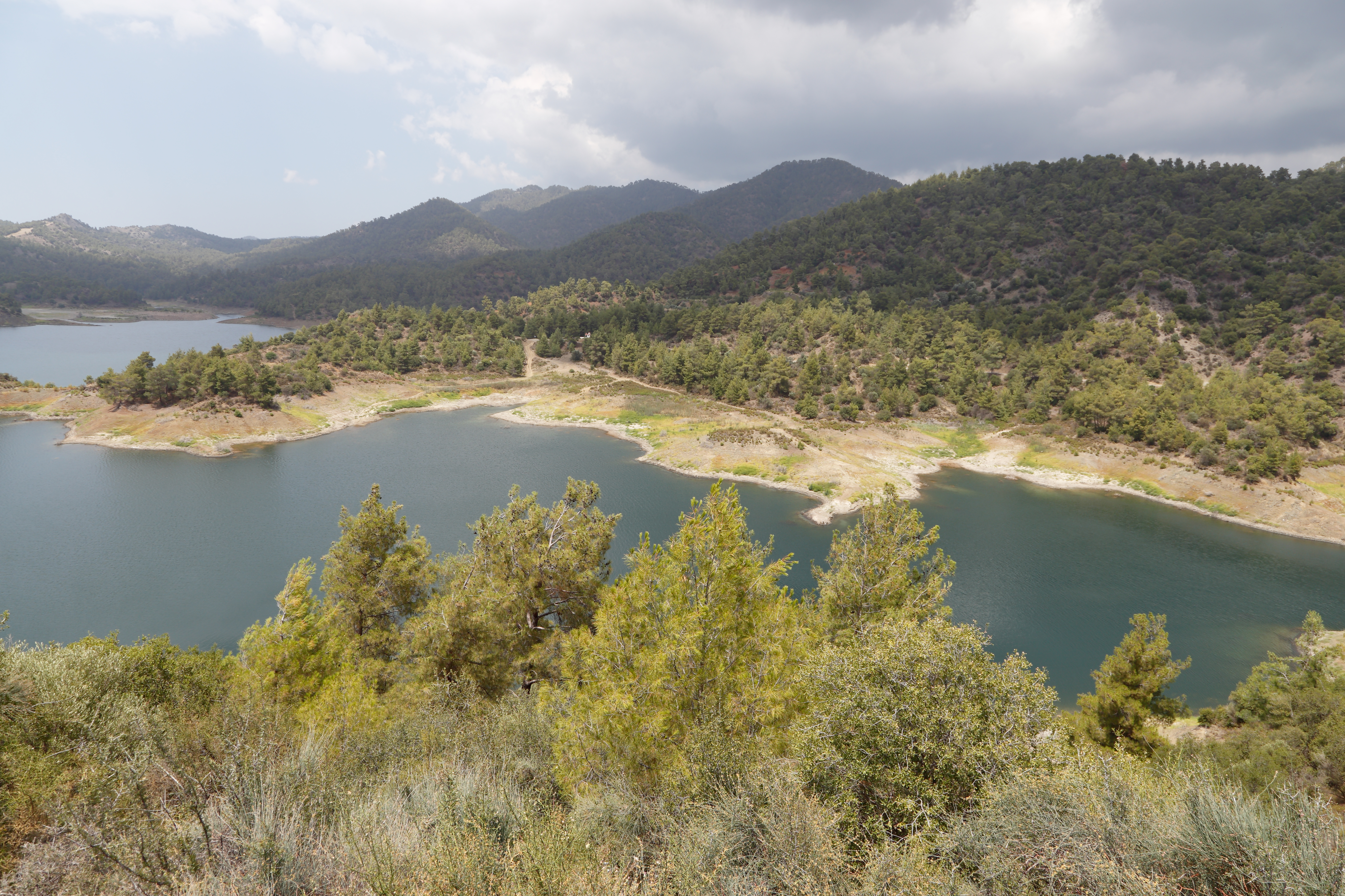 Kannaviou Reservoir, Cyprus